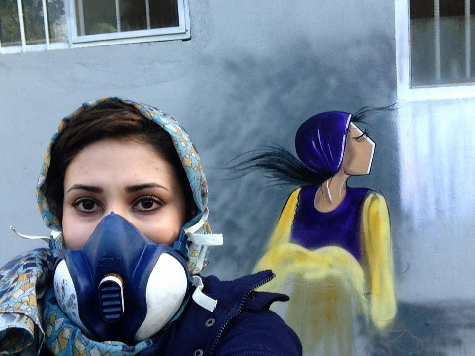 Portrait de l'artiste grafeuse Shamsia Hassani